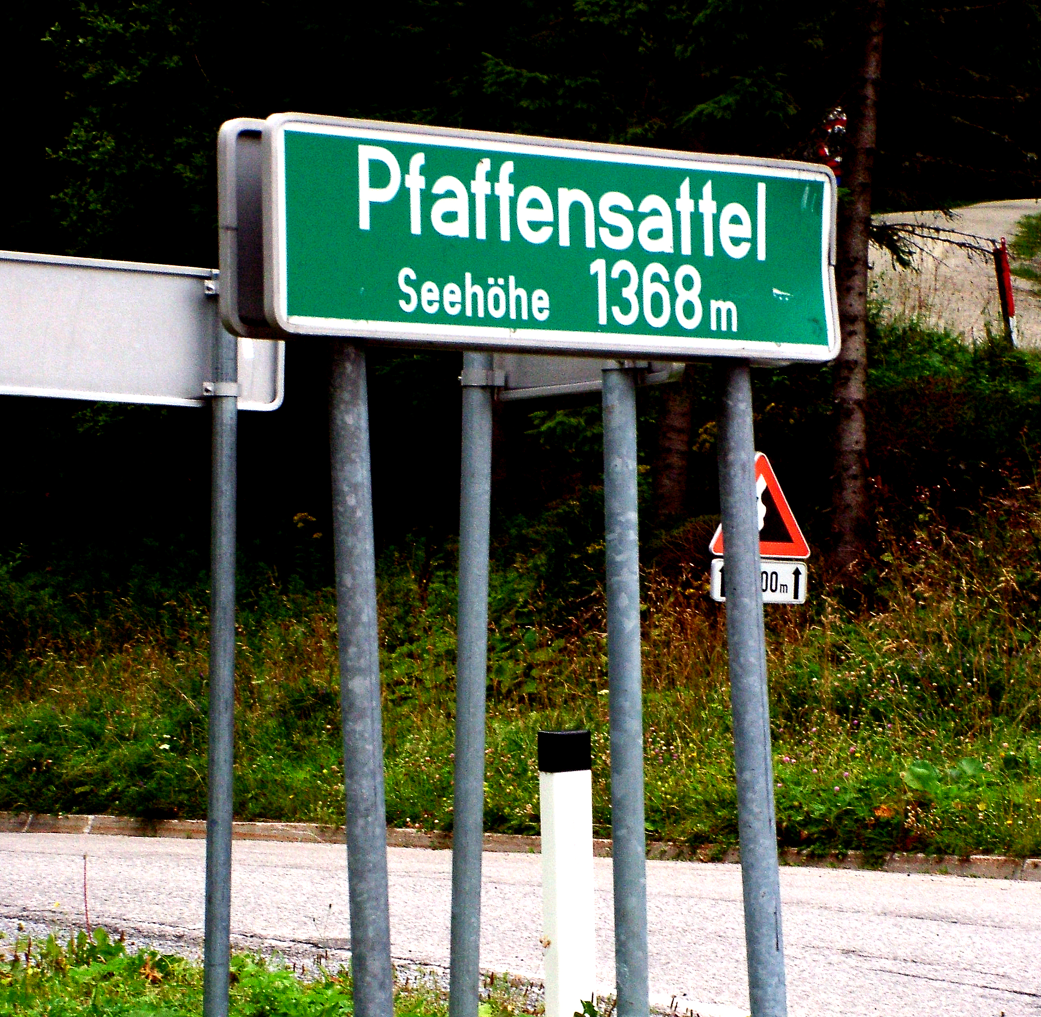 Pfaffen-hágó (Stájerország, Ausztria)